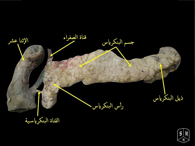 البنكرياس وبعض الأعضاء القريبة منه